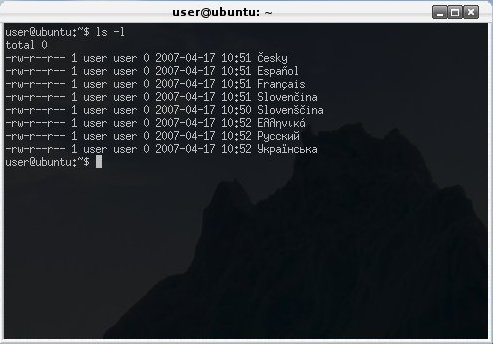 un screenshot de urxvt